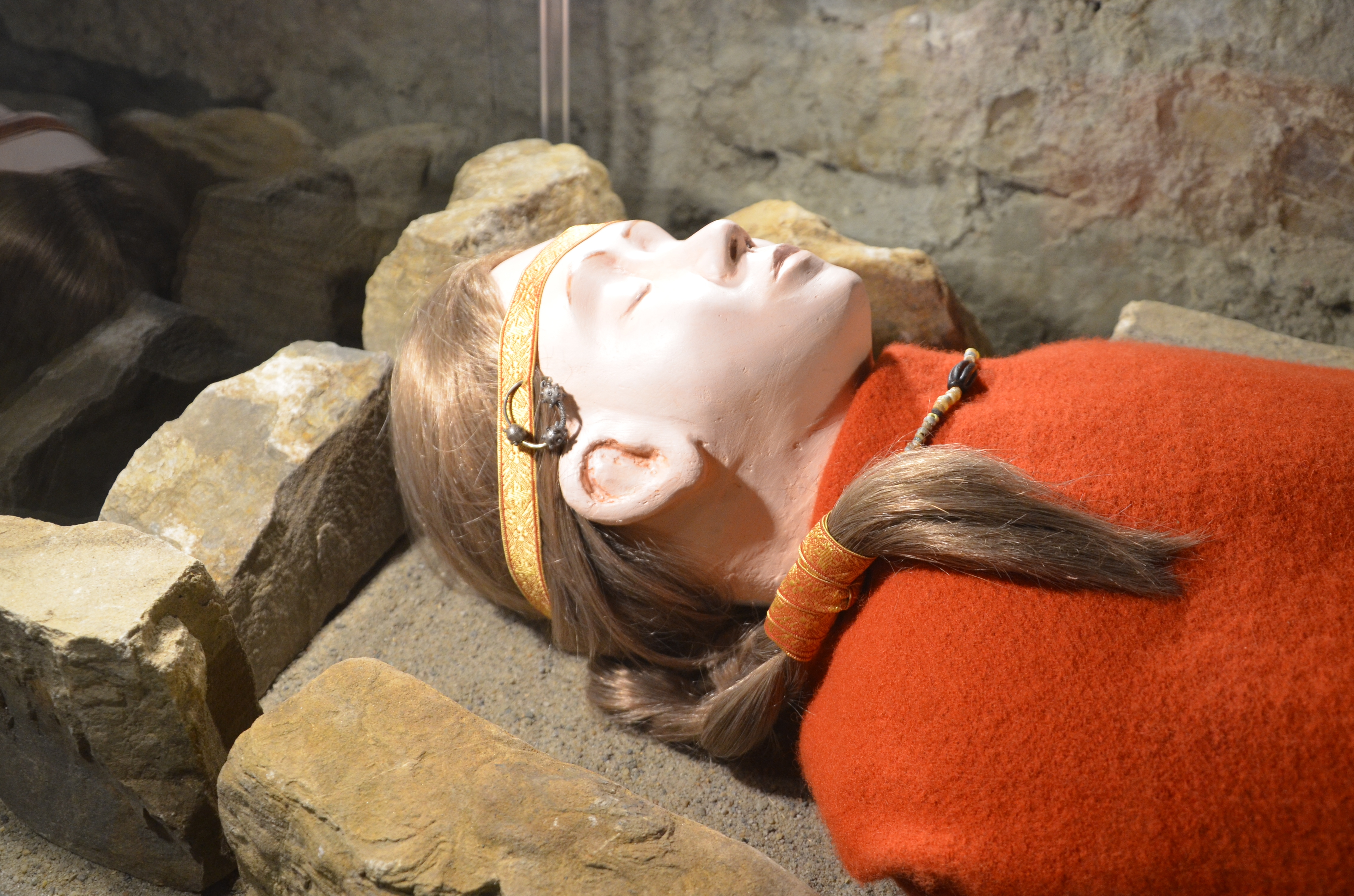 Kleidungsstücke (Replikate) beim Mädchen-Grab mit Steinsetzung, Ohrringe im spätbyzantinischen Stil im Rurikid Zeitraum, 12. Jahrhundert, Trepcza-Sanok am San, Ost-Beskiden